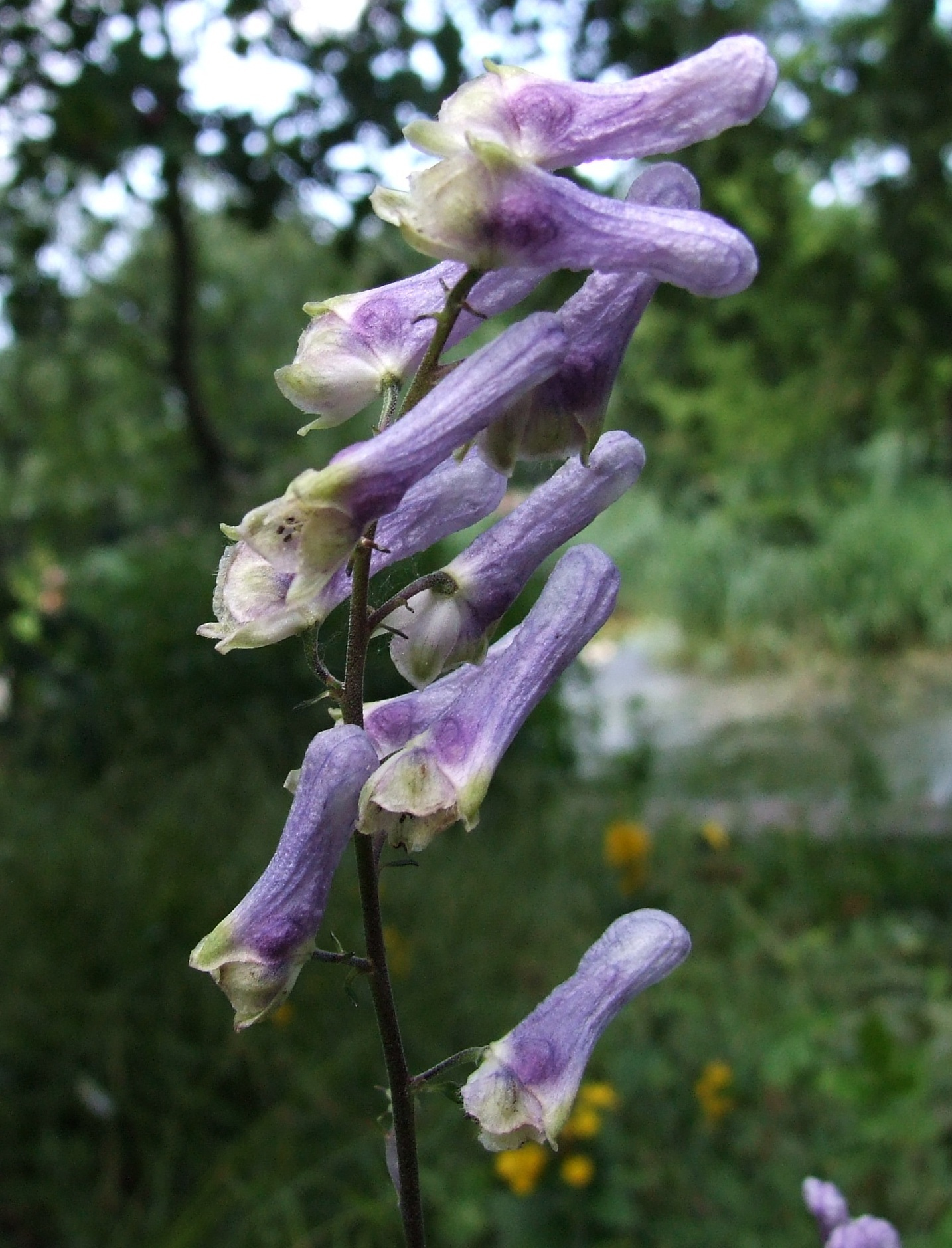 Aconitum moldavicum (pl. tojad mołdawski, Ogród Botaniczny w Krakowie)